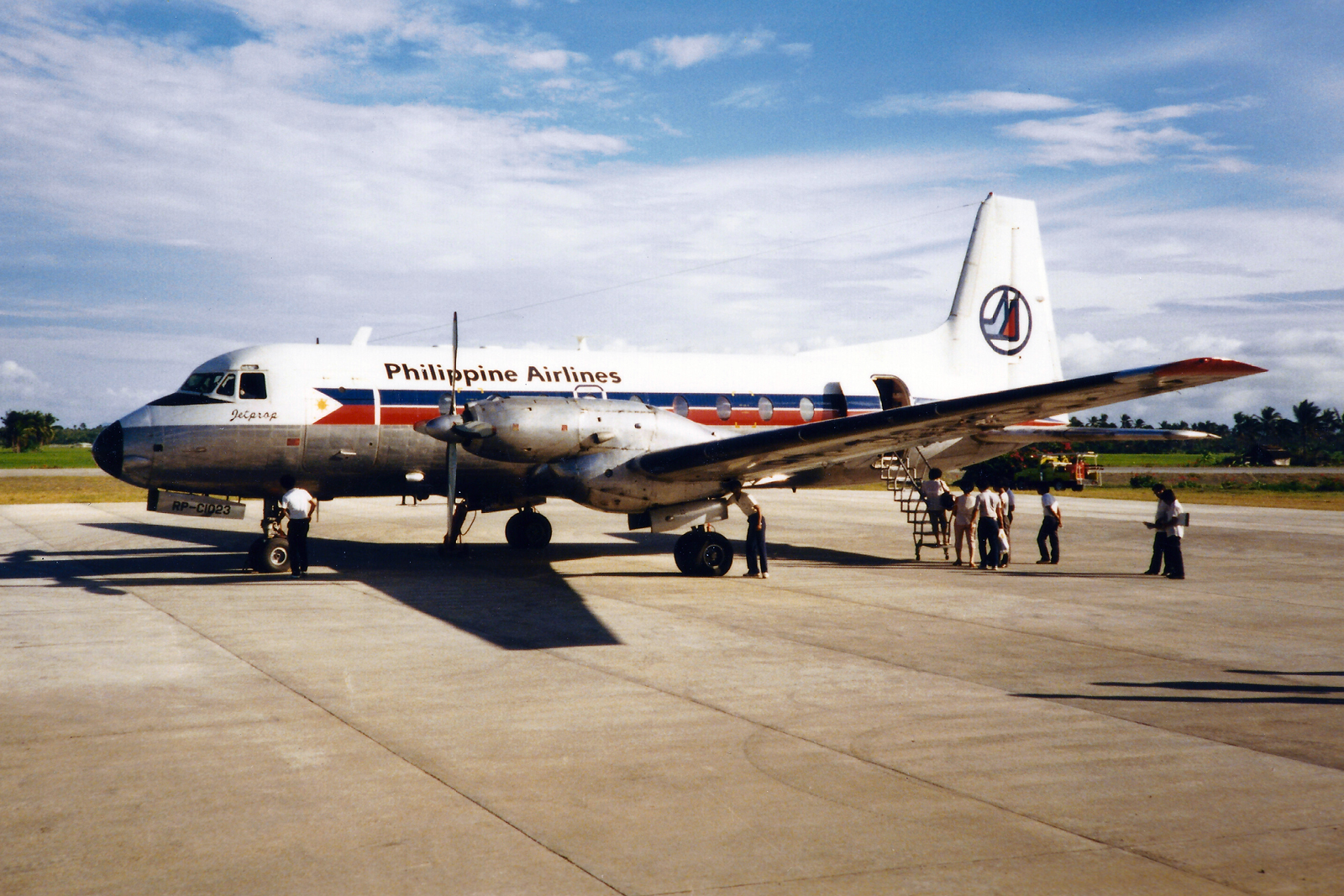 Aklan - Kalibo (KLO / RPVK) Philippines 3.1985